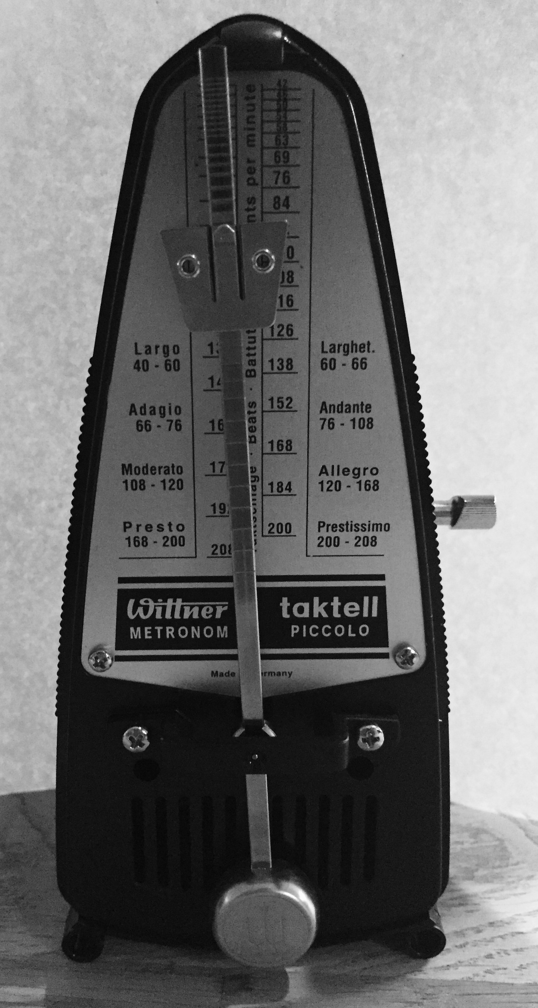 Wittner Taktell piccolo noir.